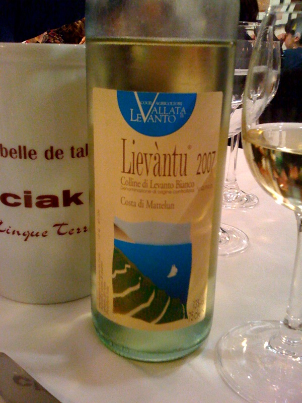 Ligurian Colline do Levanto wine made from Vermintino, Albarola and Bosco.